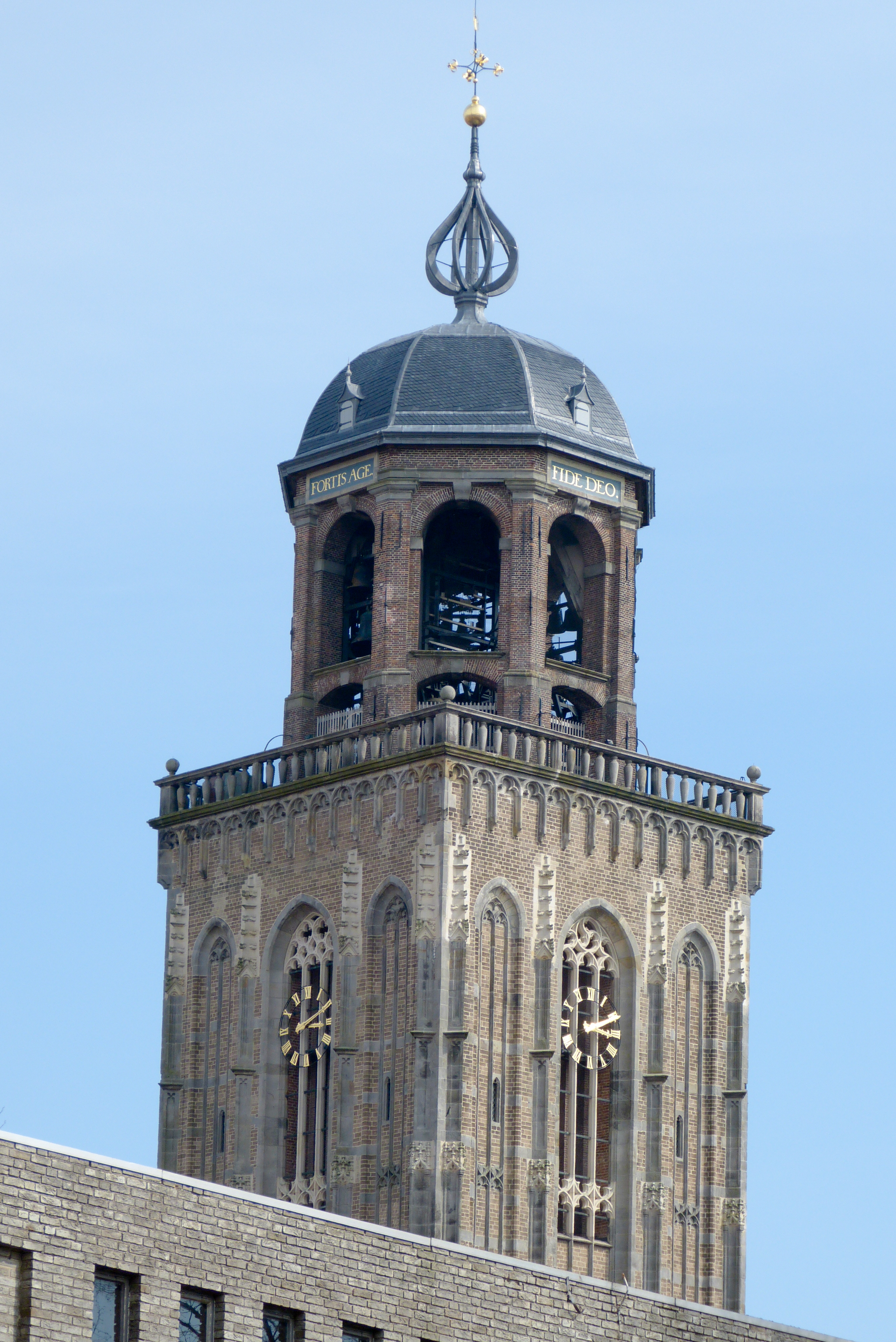 Panasonic DMC FZ-150 samples II